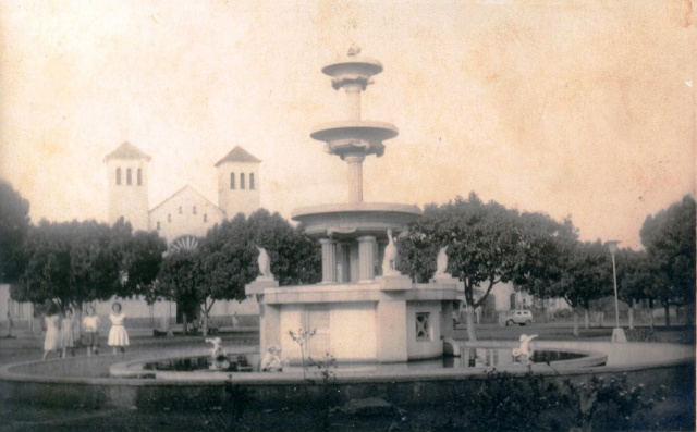 Foto da fonte defronte à Igreja Matriz, sem data definida, provavelmente da década de 70.